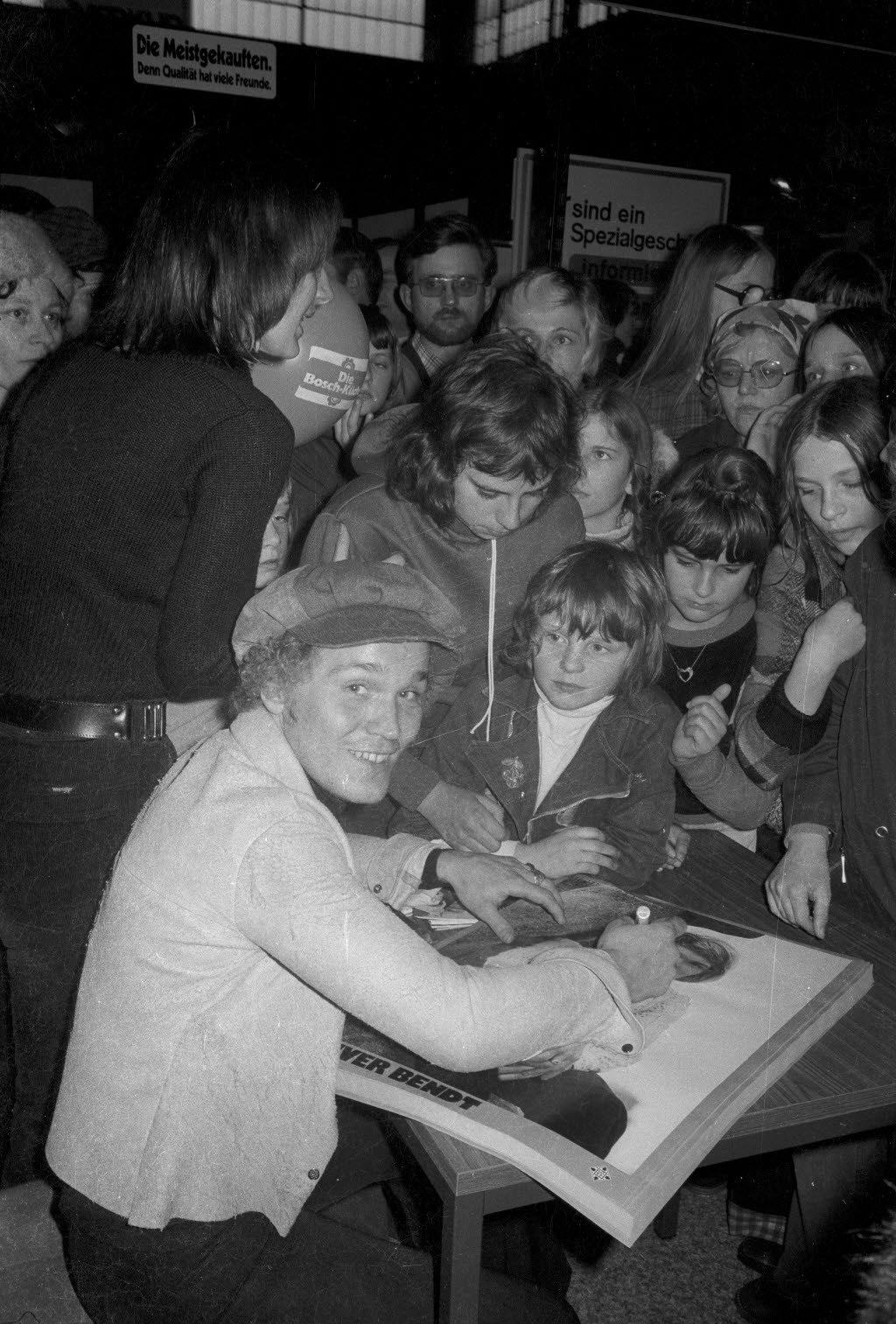 am Stand der Kieler Nachrichten (KN) auf der Producta 75 in der Ostseehalle.